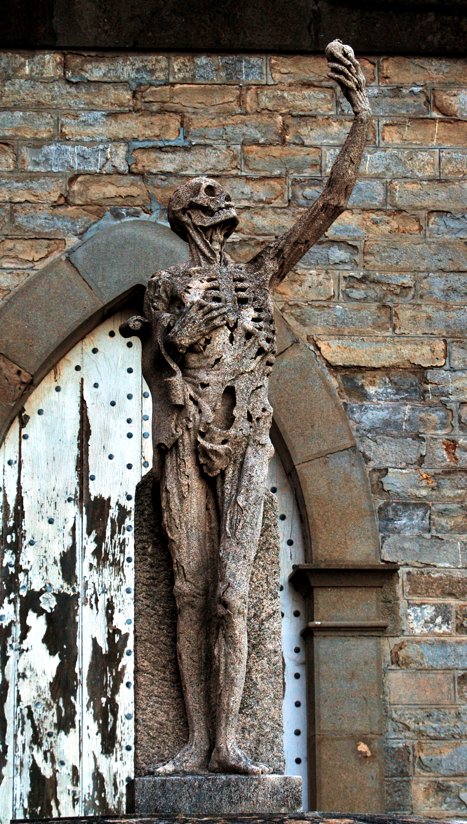 Transi de René de Chalon, réplique par François Pompon d'après l'œuvre de Ligier Richier, sur la tombe d'Henry Bataille à Moux, en France.